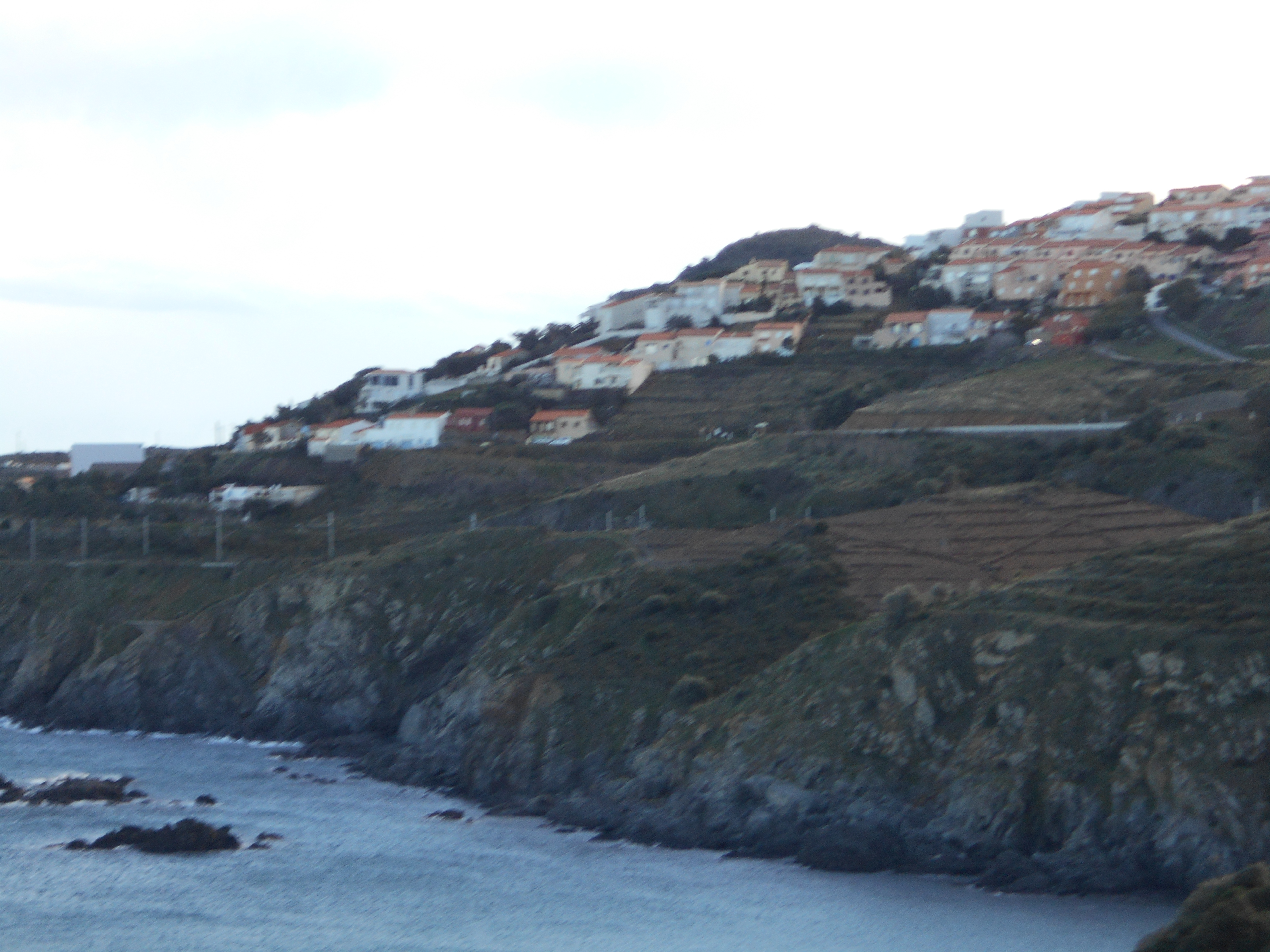 Mas Nadal, de Cervera de la Marenda, des del nord, al costat oposat de la part principal del poble.